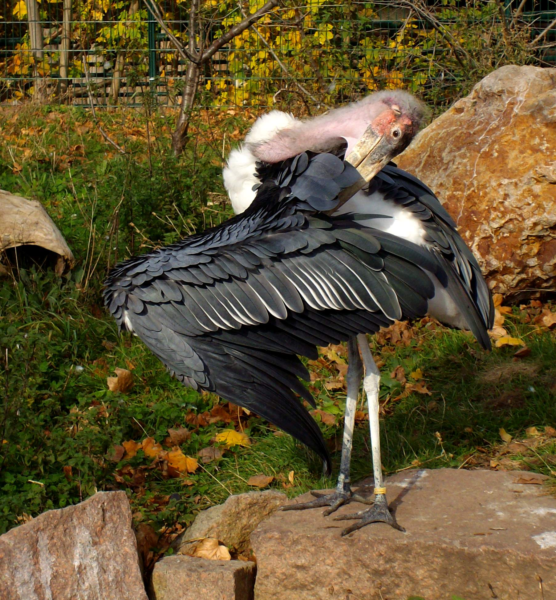 Leptoptilos crumeniferus, Marabu, Bergzoo Halle